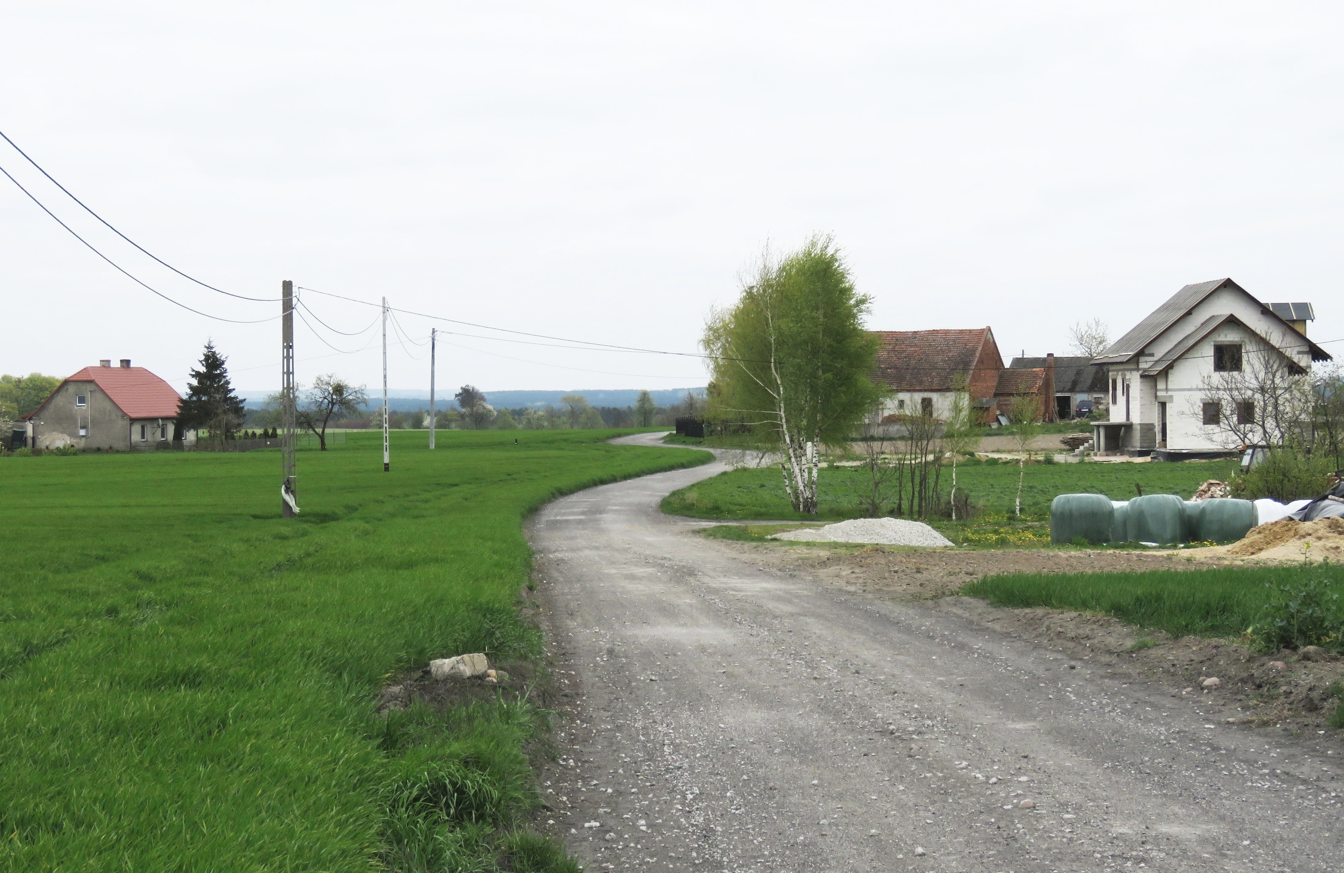 Florencja, gmina Bobrowo